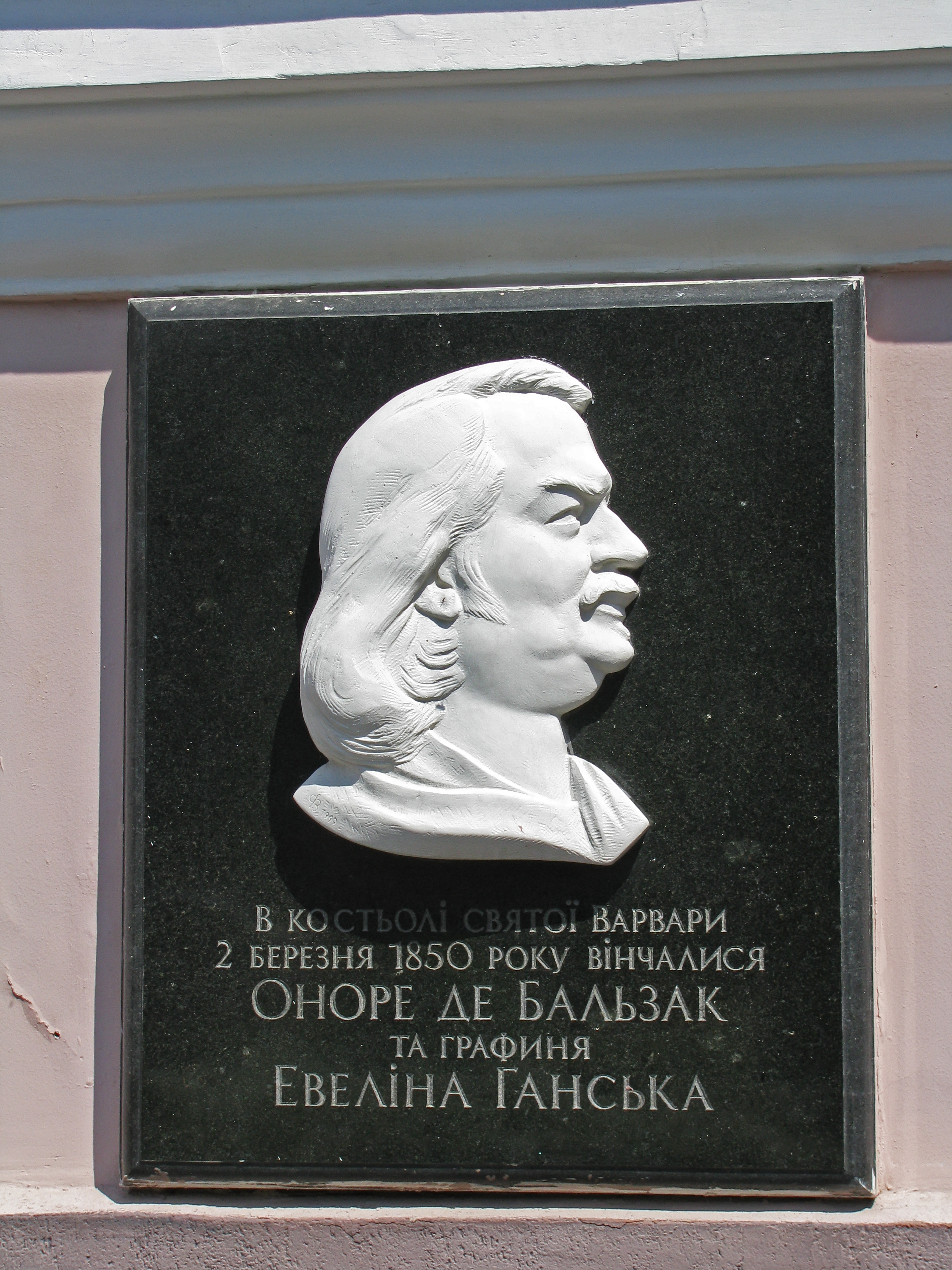 Костьол св. Варвари, в якому в 1850 р. вінчався Оноре де Бальзак, французський письменник ., Бердичів, Вул. К. Лібкнехта, 25